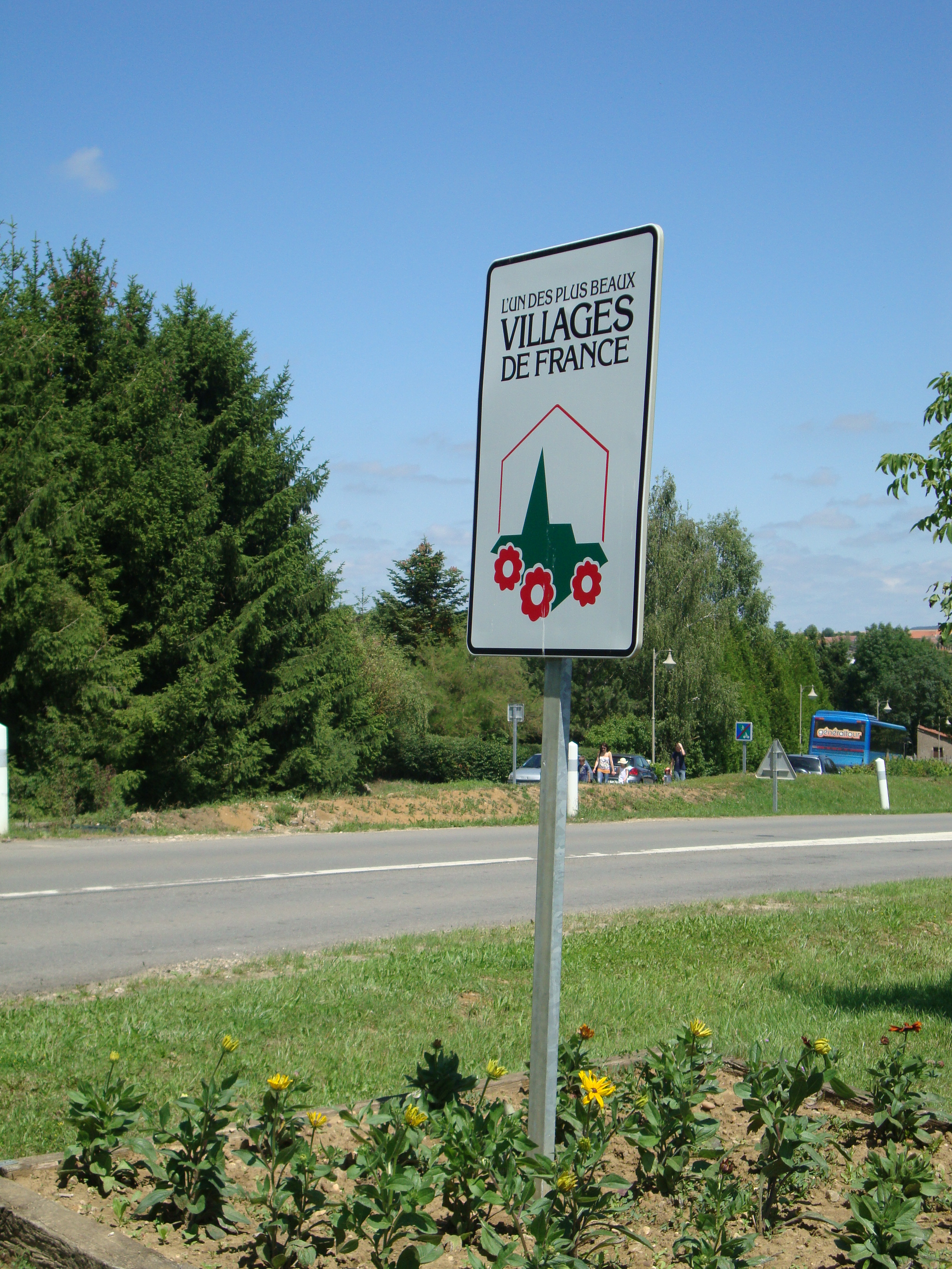 Rodemack (57)